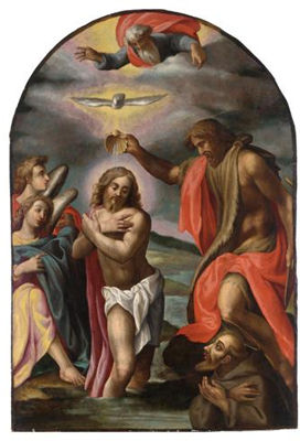 Le Baptême du Christ.